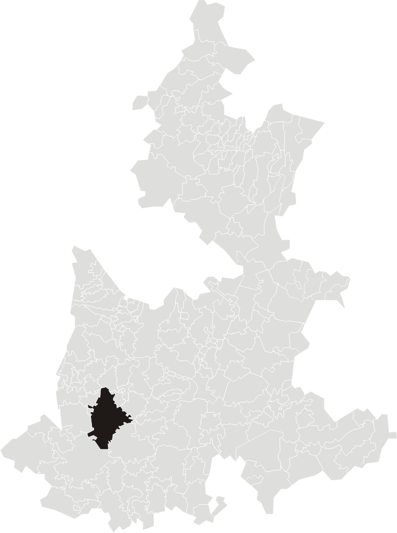 Mapa de localización de Izúcar de Matamoros, en el estado de Puebla (México)